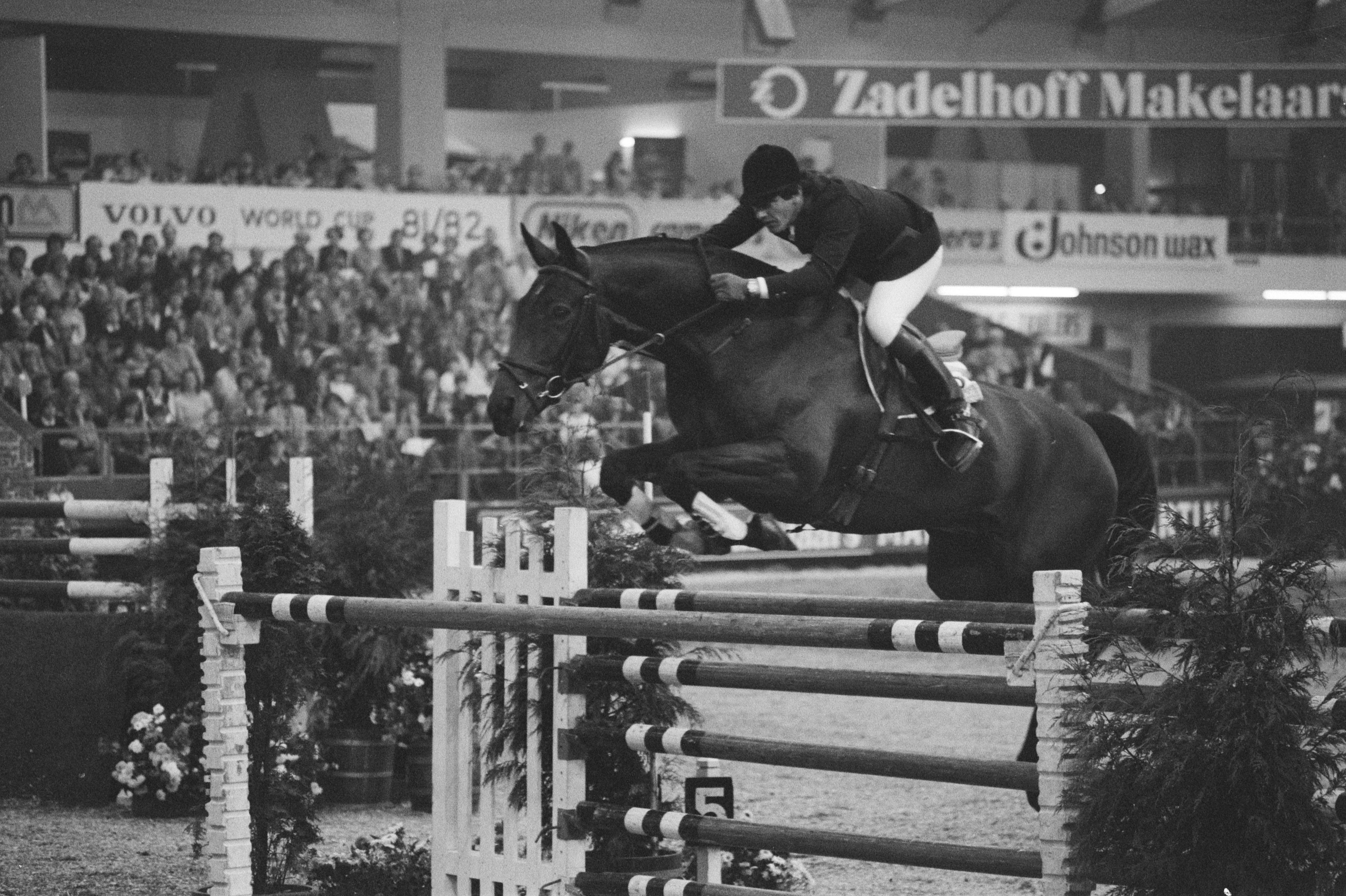 Collectie / Archief : Fotocollectie Anefo Reportage / Serie : Jumping Amsterdam in de RAI; Grote Prijs van Amsterdam Beschrijving : Hervé Godignon (Frankrijk) op Gitan P. in aktie Datum : 1 november 1981 Locatie : Amsterdam, Noord-Holland Trefwoorden : Gitan P. (paard), concours hippique Persoonsnaam : Godignon, Hervé Instellingsnaam : Jumping Amsterdam Fotograaf : Antonisse, Marcel / Anefo Auteursrechthebbende : Nationaal Archief Materiaalsoort : Negatief (zwart/wit) Nummer archiefinventaris : bekijk toegang 2.24.01.05 Bestanddeelnummer : 931-7788